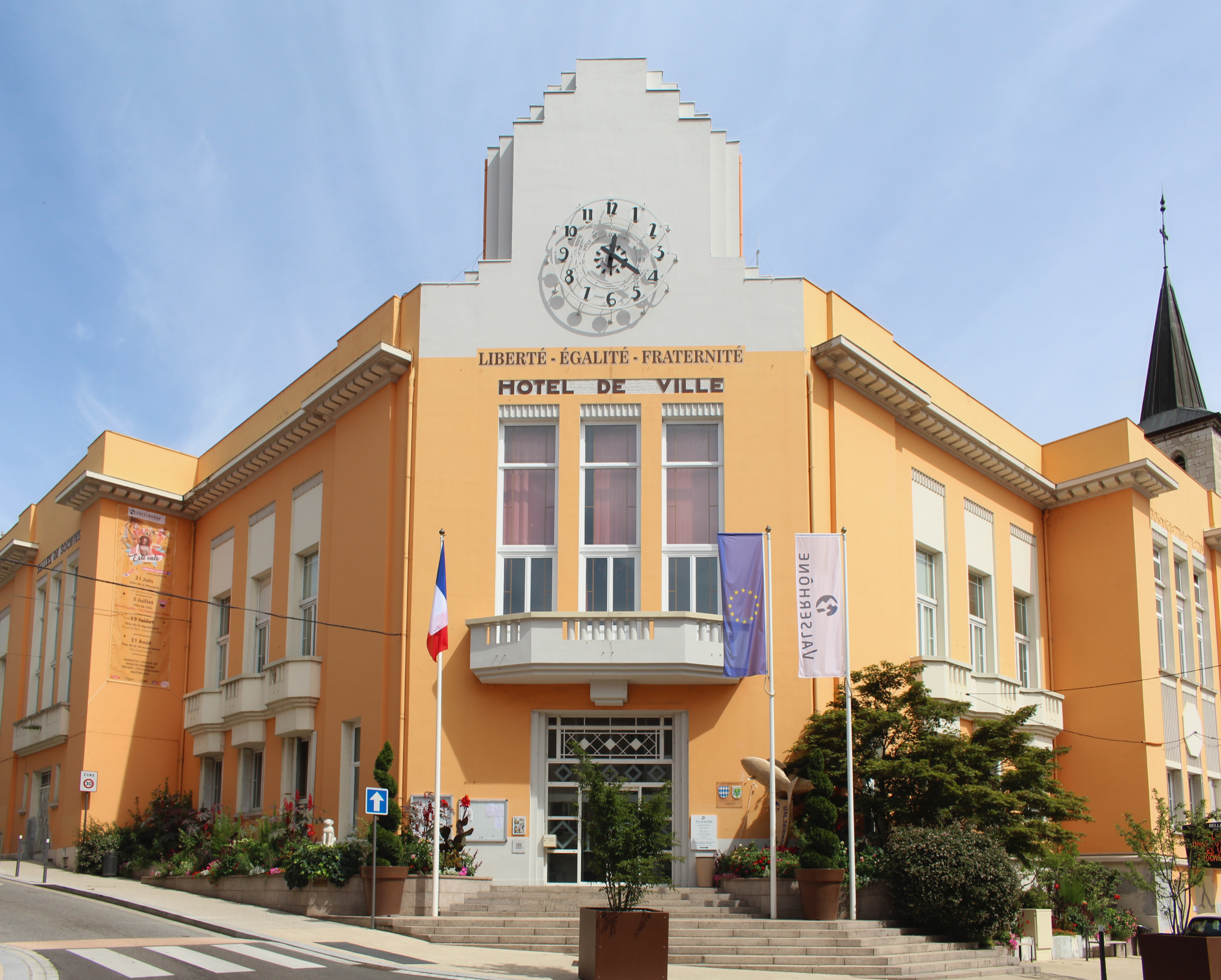 Hôtel de ville de Bellegarde-sur-Valserine, Valserhône.